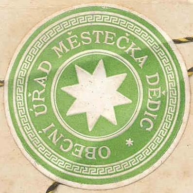 Obecní úřad městečka Dědic, přelepka, rok 1905